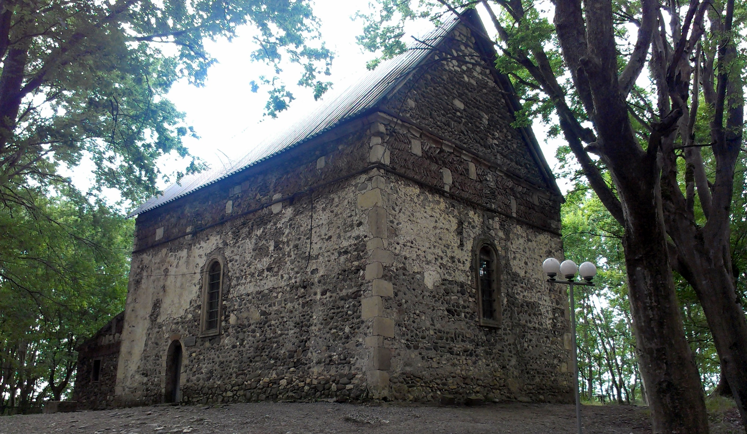 ეკლესია ვარციხეში